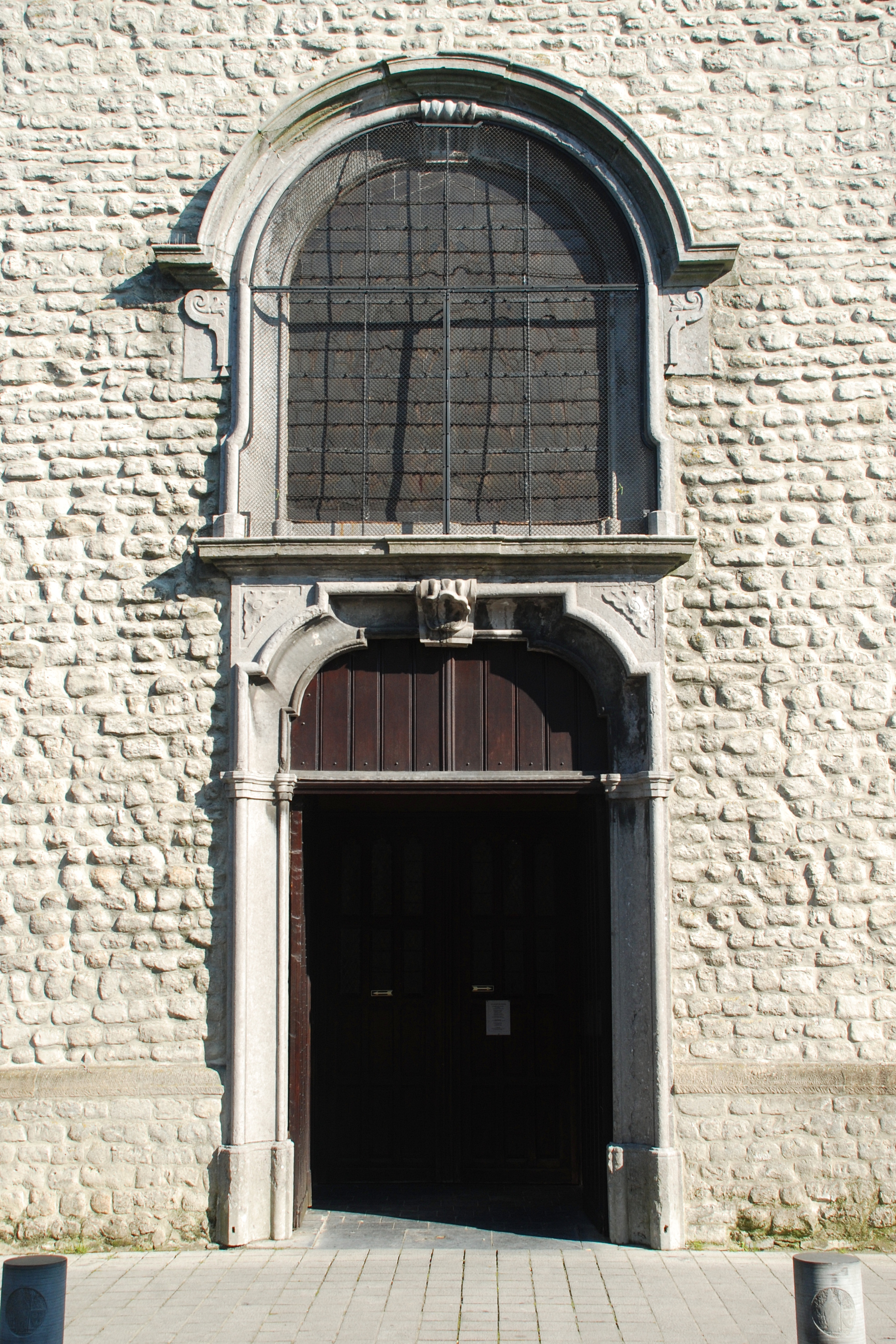 Belgique - Brabant wallon - Église Saint-Nicolas de La Hulpe